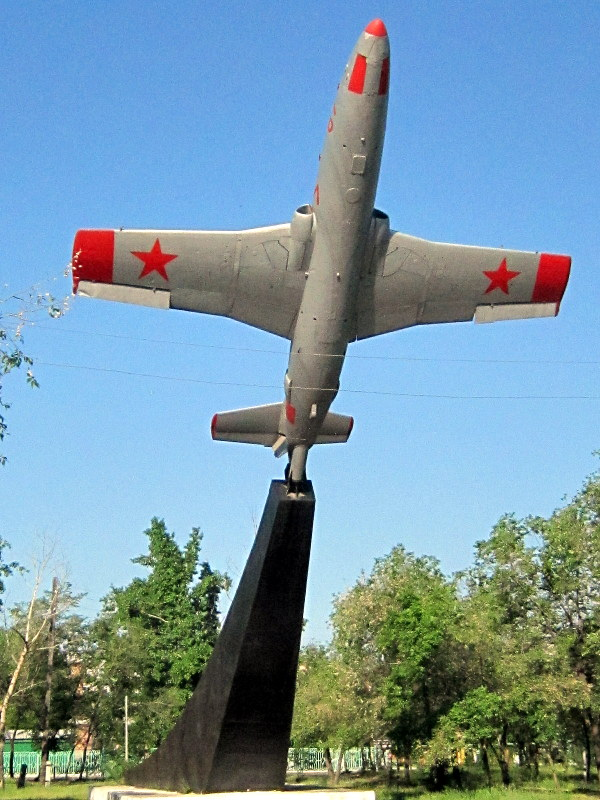 Черногорск. Памятник лётчикам Бирмской авиашколы.